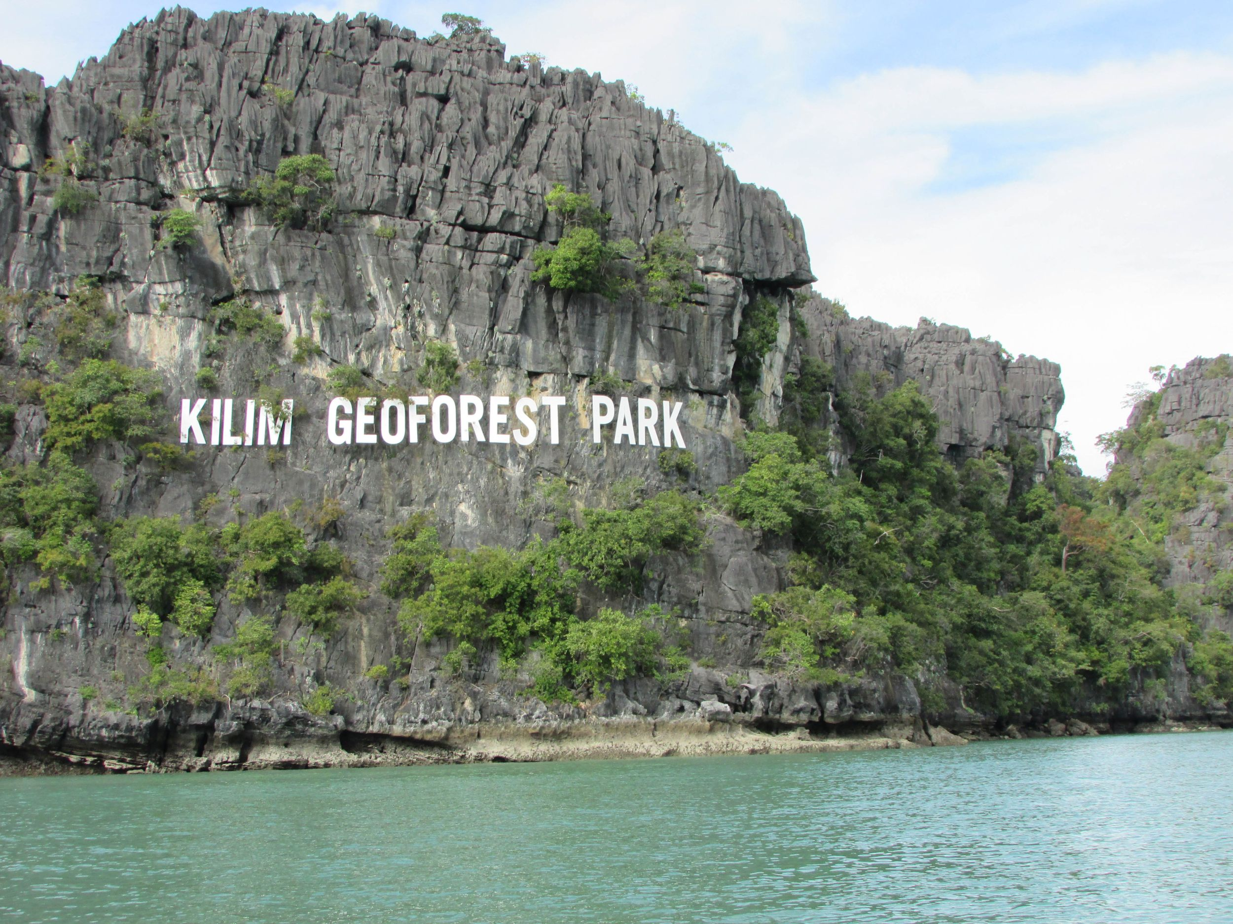 Kilim Geoforest Park